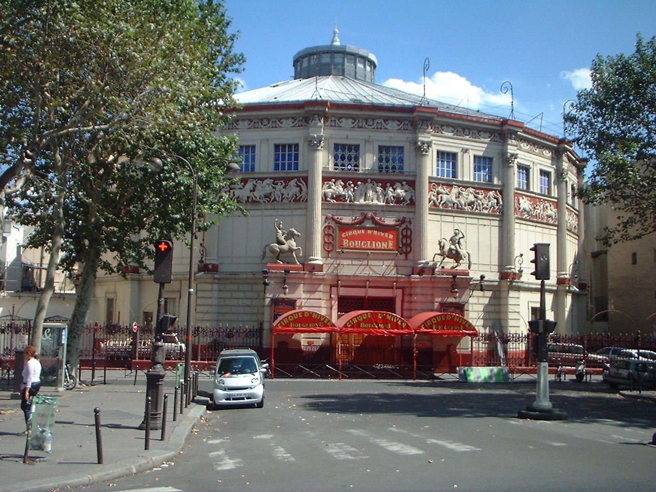 Paris, France: Cirque d'hiver (Winter Circus)